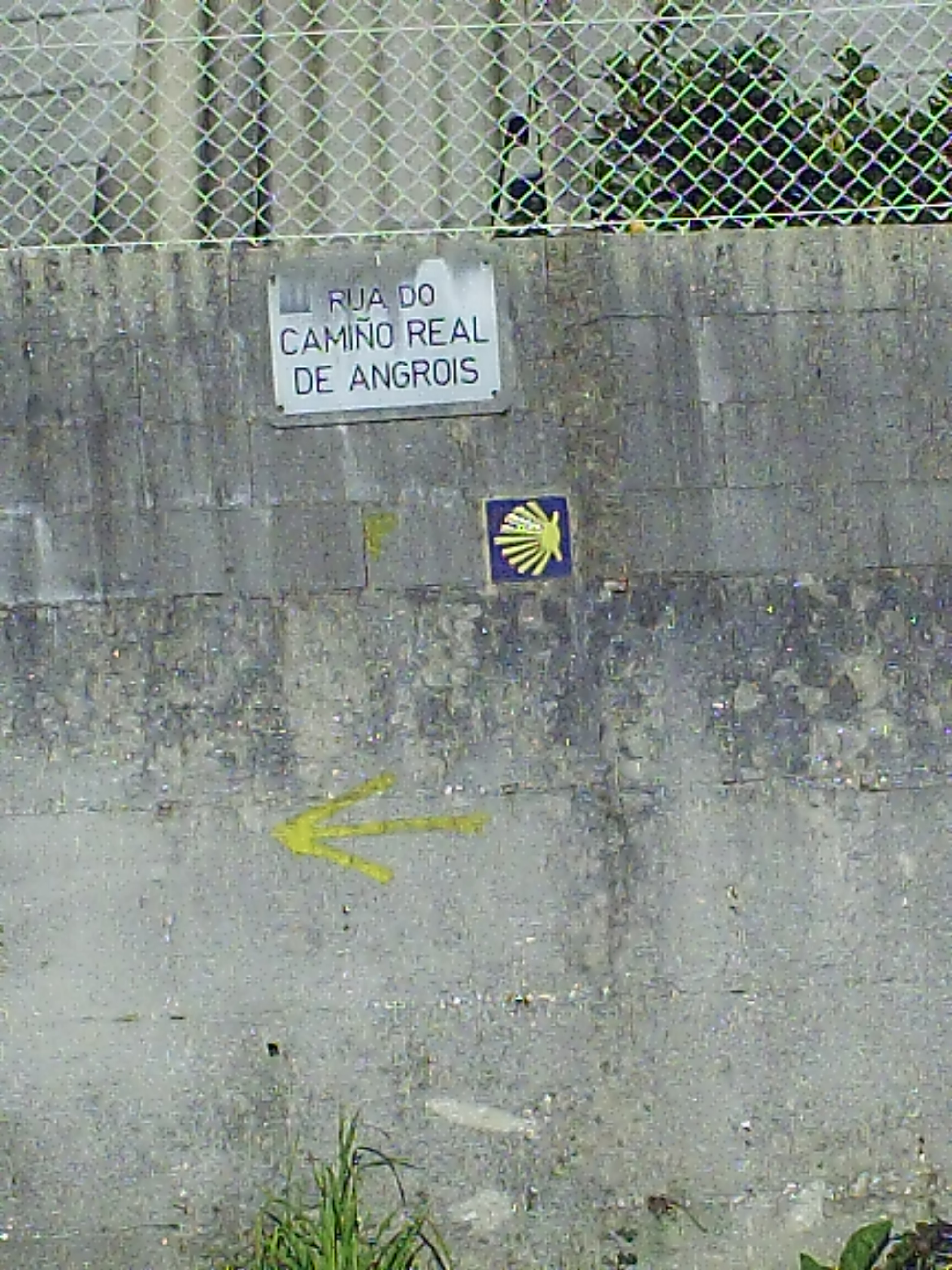 Señales del camino en Angrois